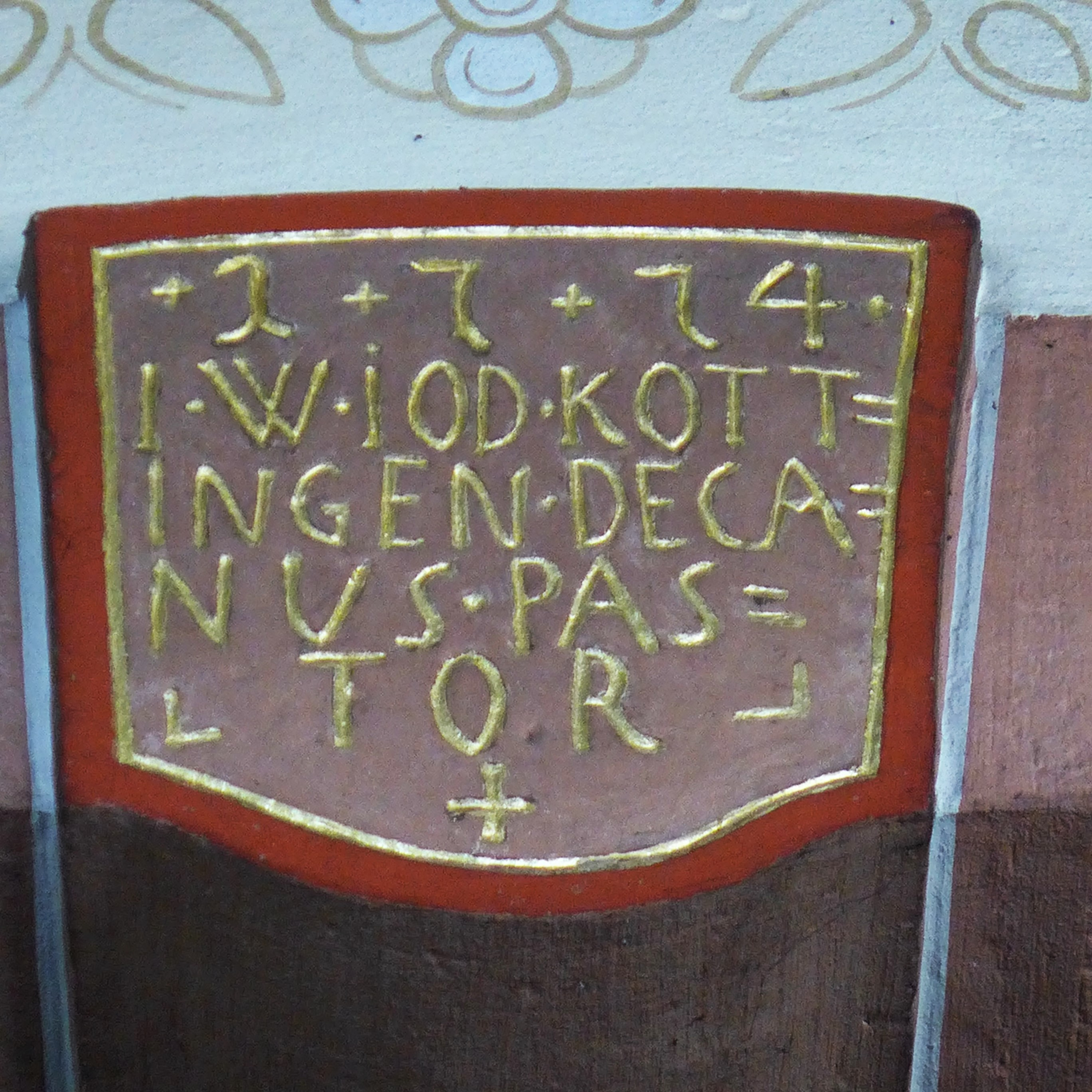 Körprich, Kapelle, Inneres, Chorraum, Schlussstein des Chorbogens